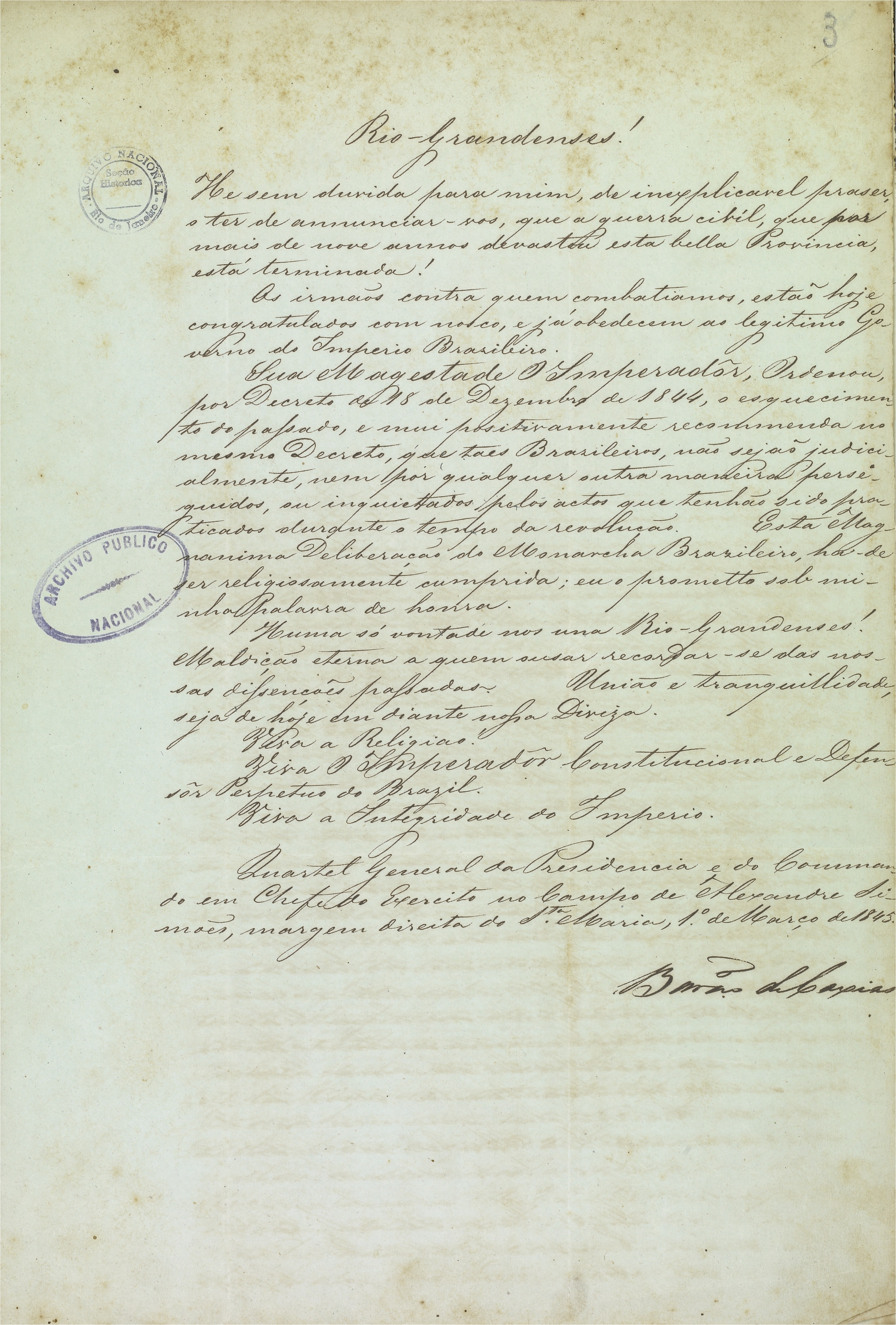 Declaração do Barão de Caxias anunciando o fim da Revolução Farroupilha. Fundo Caxias, doc. 288, f3, cx.810, pct. 6.